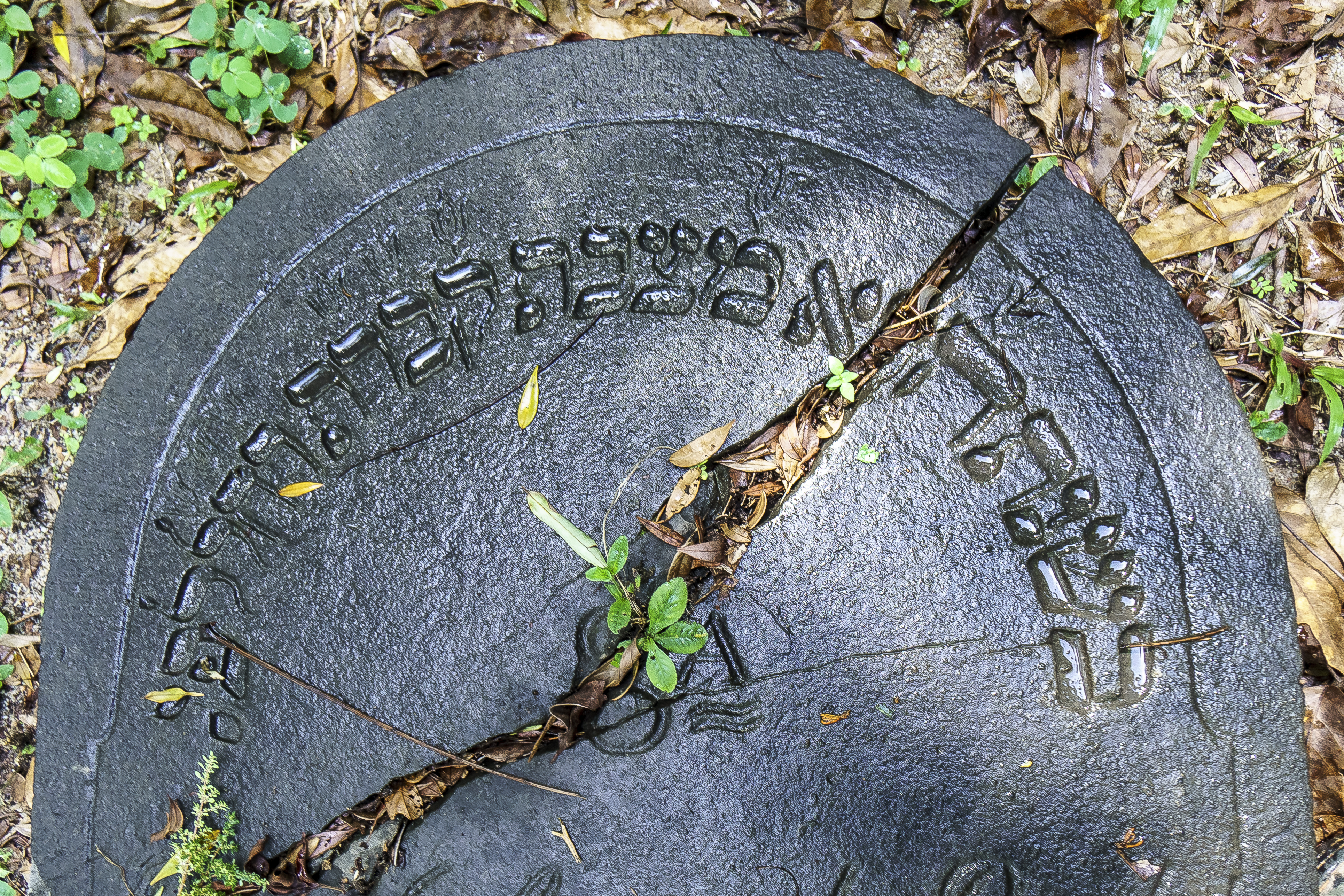 Gravestone - Jodensavanne (Jewish Savanna)